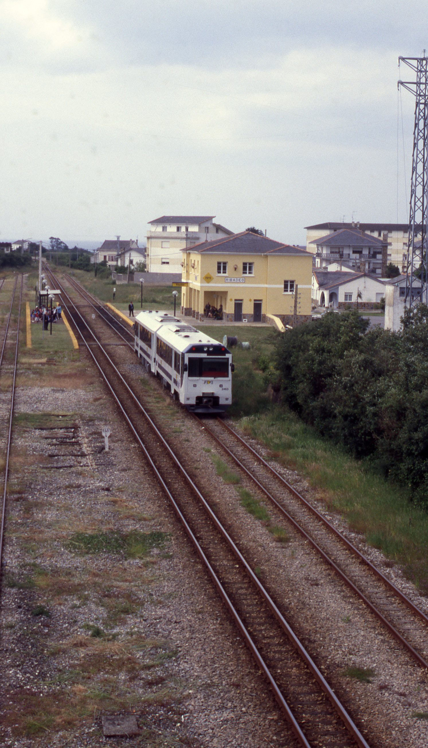 Binnenkomende trein in Ribadeo